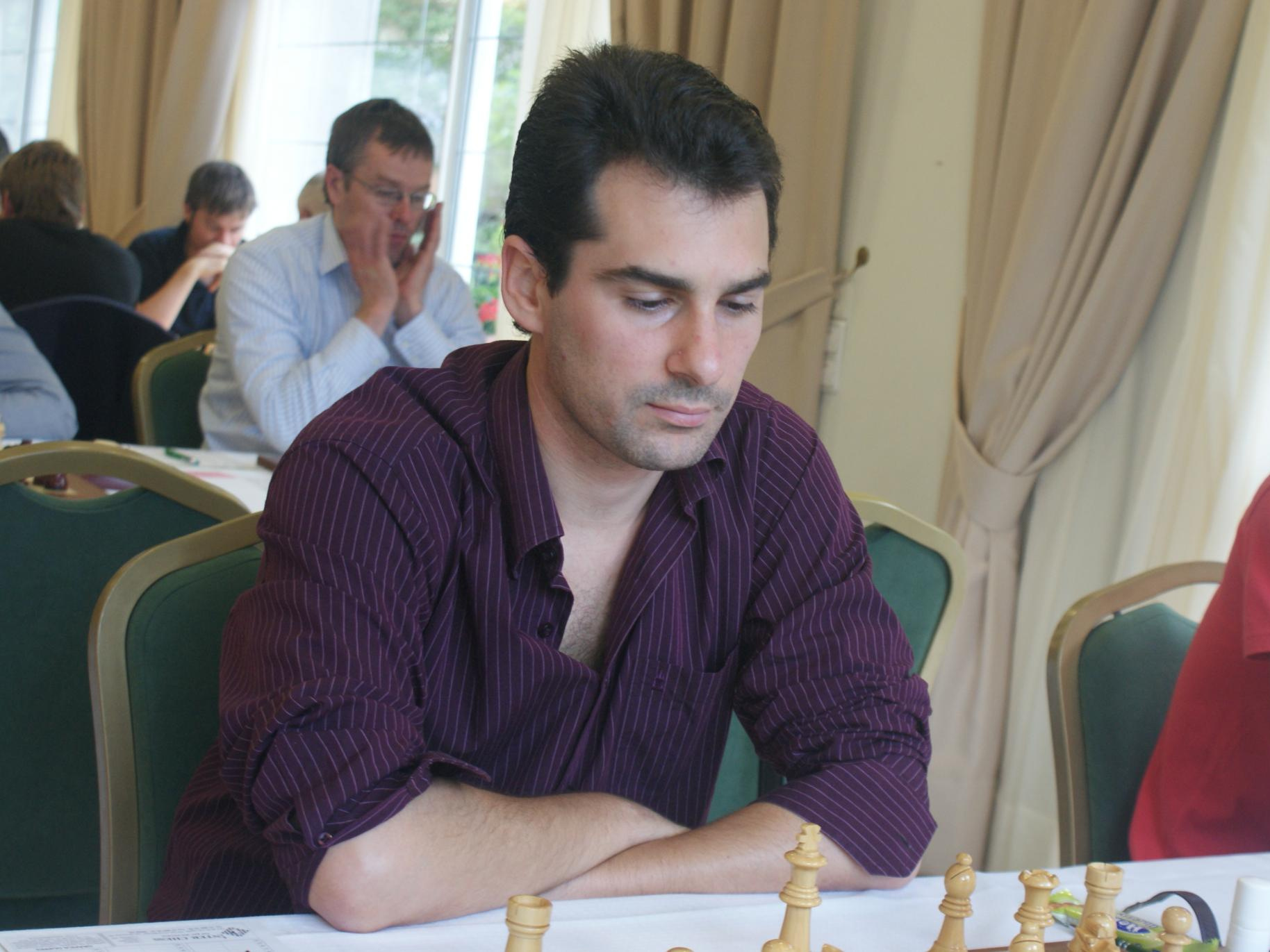 GM Fernando Peralta, 31è Open Internacional d'Andorra, Hotel Sant Gothard, Ronda 5 - 24/07/2013